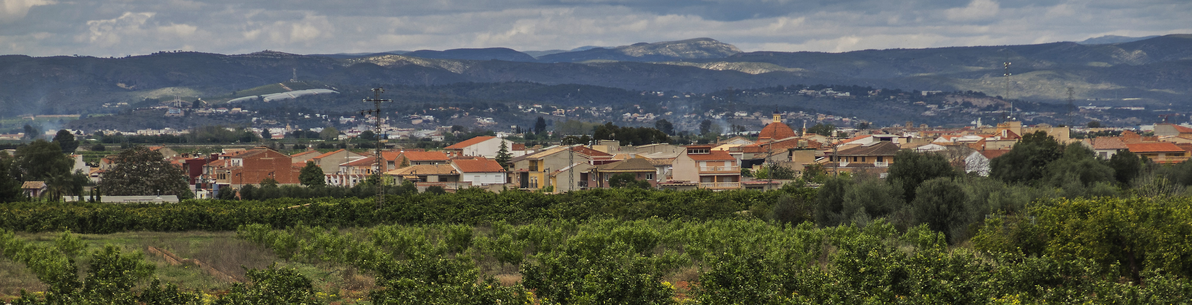 Rafelguaraf és un municipi del País Valencià situat a la comarca de la Ribera Alta.